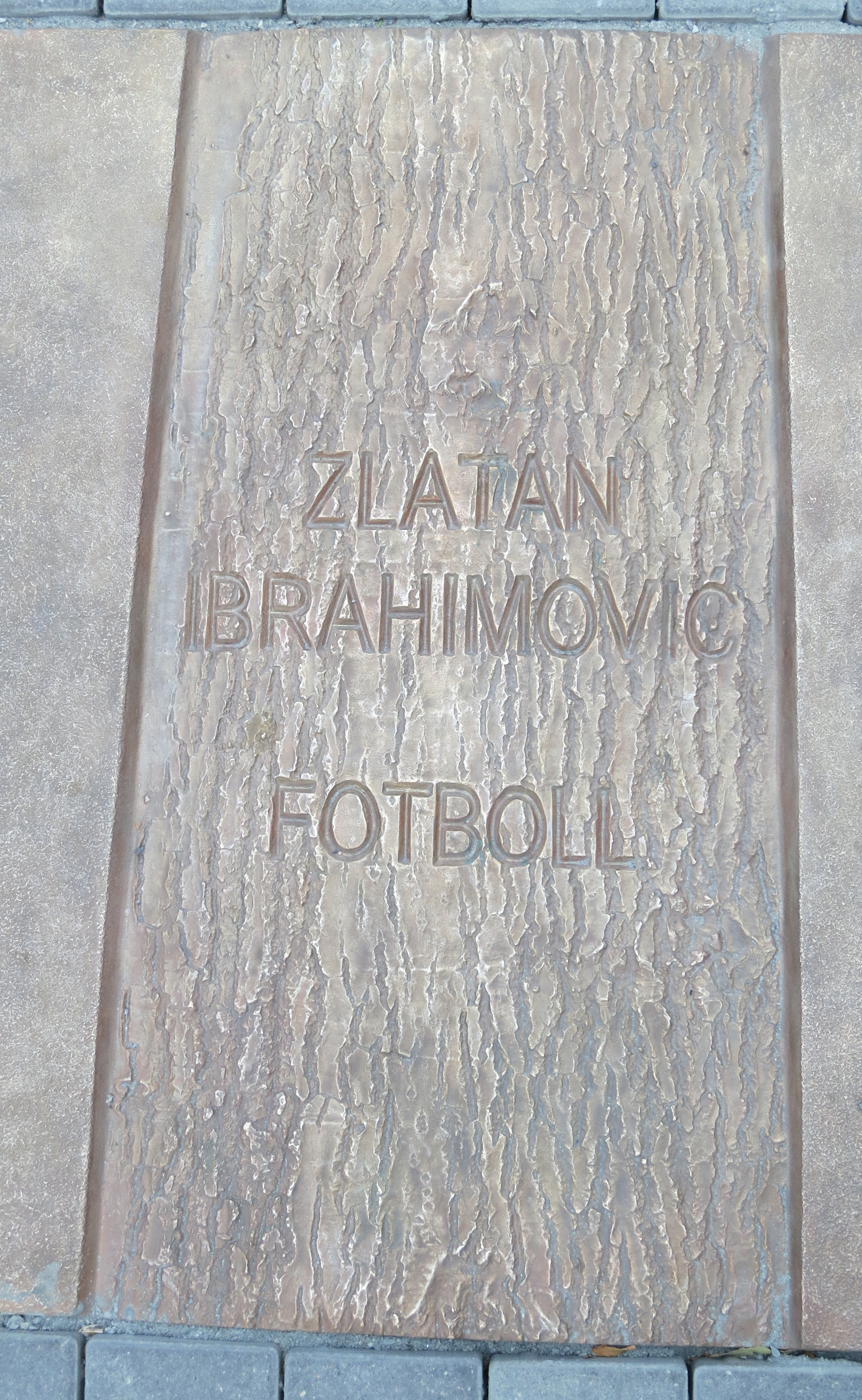 Zlatans platta på Idrottens walk of fame i Malmö